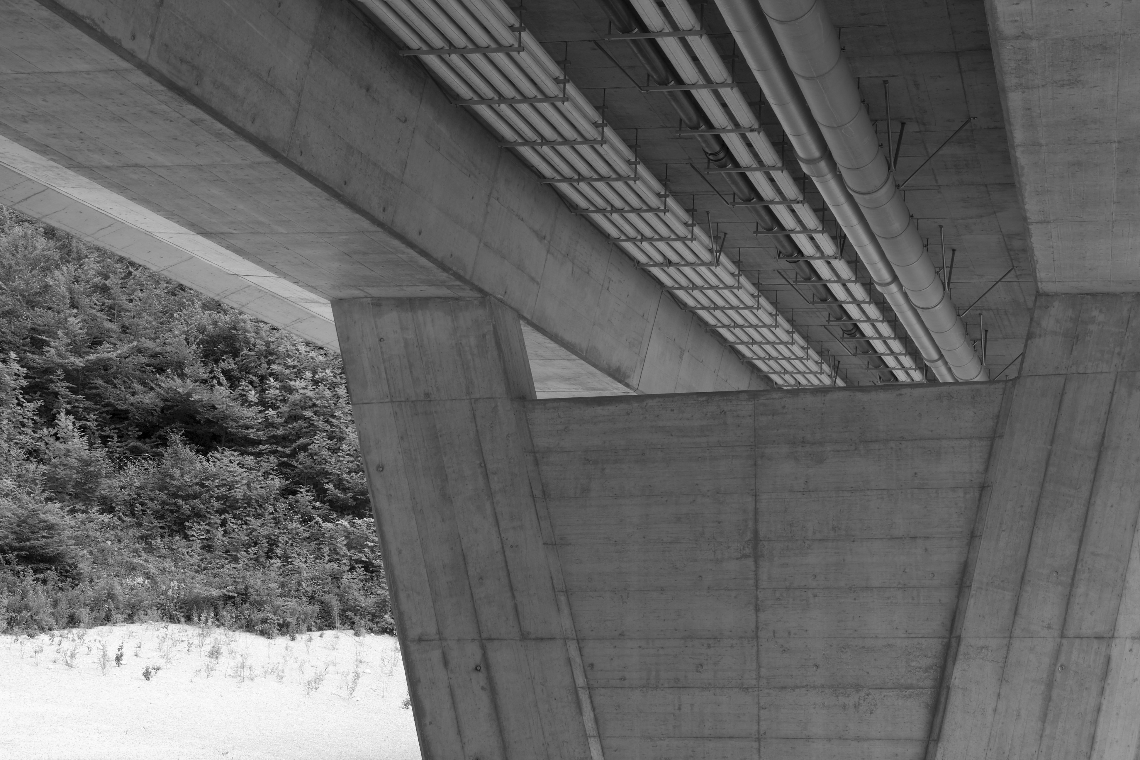 Werkleitungen unter der Autobahnbrücke bei Choindez